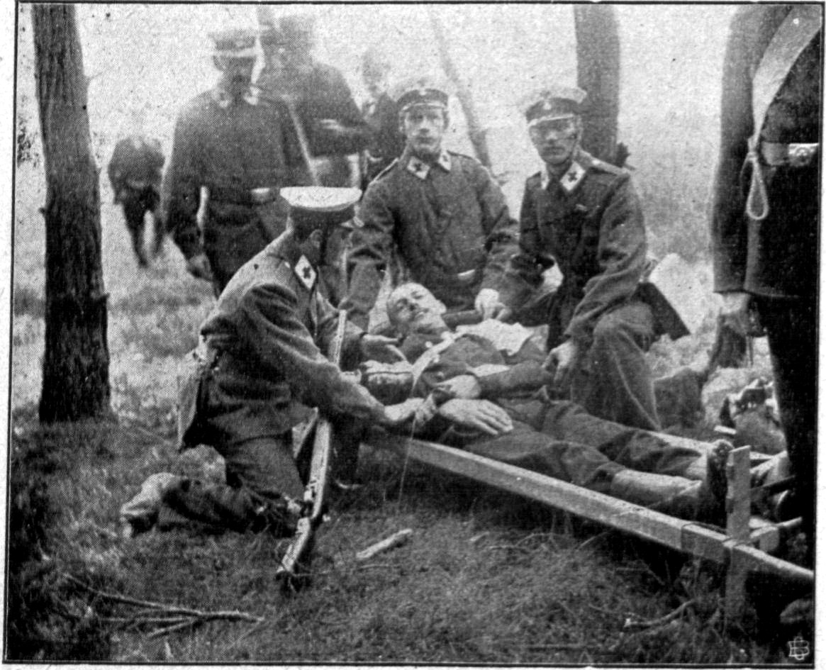 Rettung eines Verwundeten für den Transport. Im Hintergrund, zwischen dem Stehenden und sitzenden Sanitäter, steht Vizeadmiral Heinrich Kühne mit Hut und weißen Vollbart.